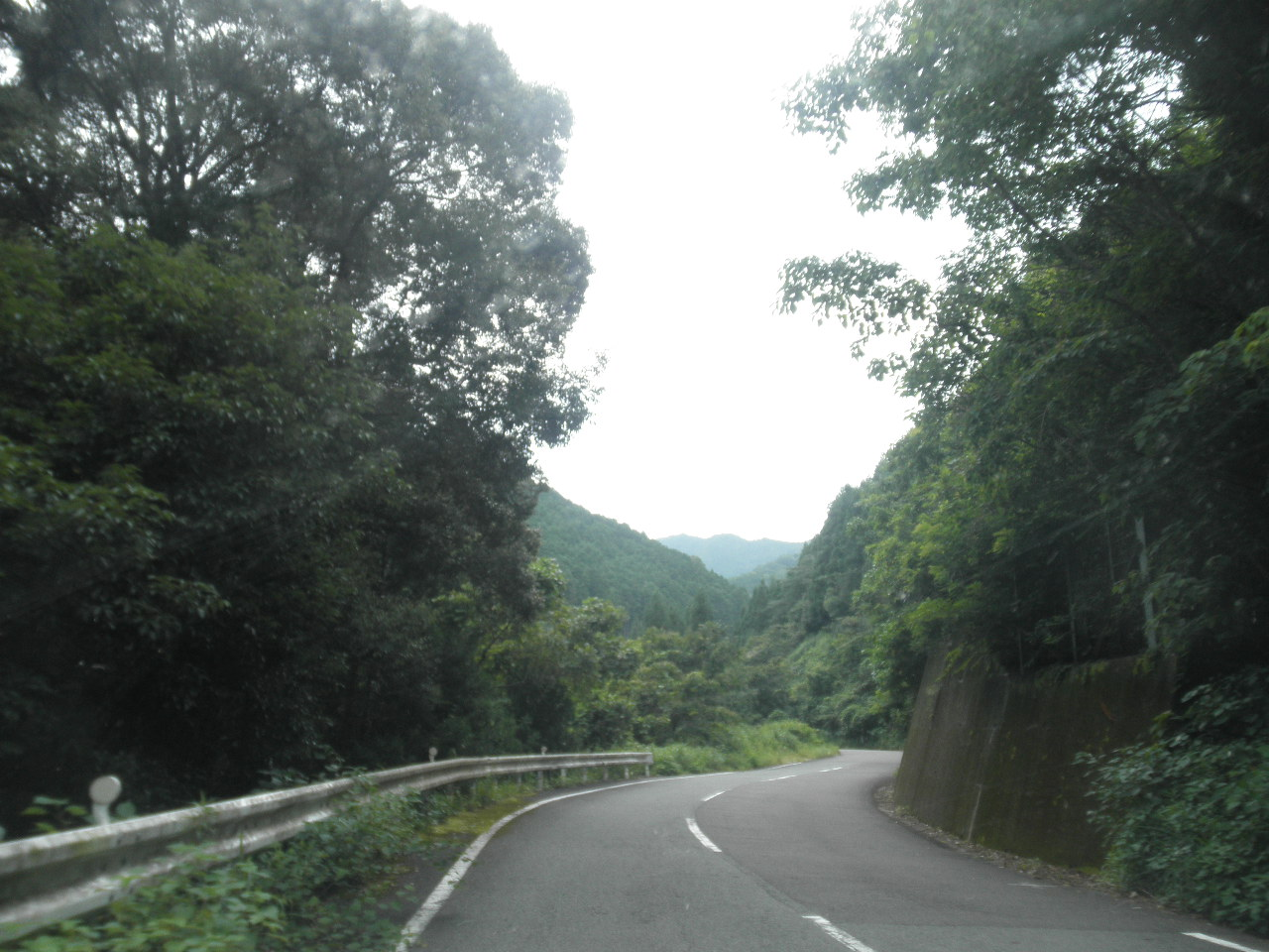 徳島県阿南市大井町南平 徳島県道283号和食勝浦線